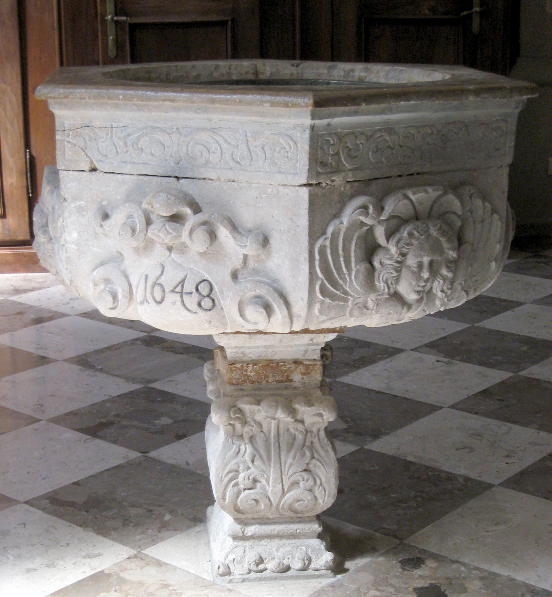 Hartberg Pfarrkirche Taufbecken